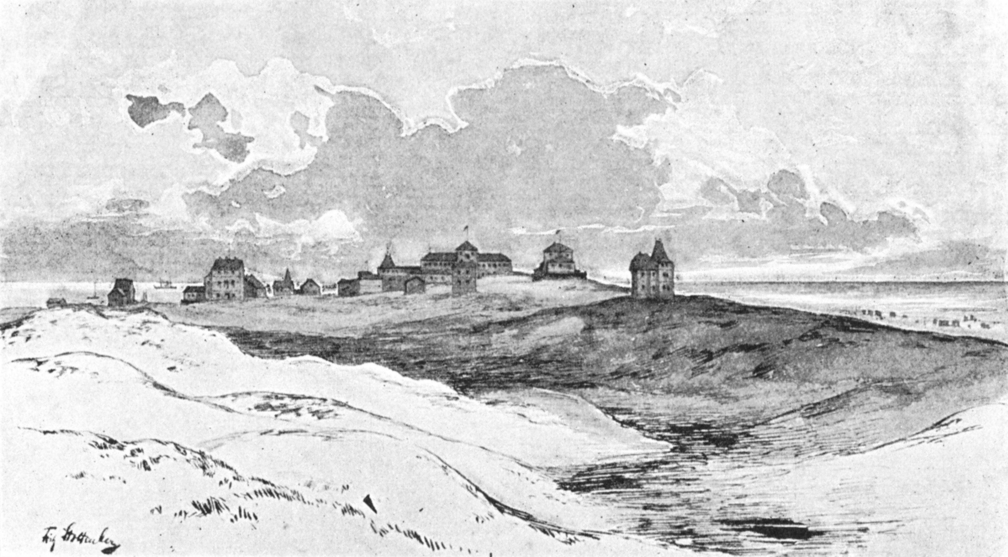 Wittdün auf Anrum, Zeichnung von Fritz Stoltenberg um 1895